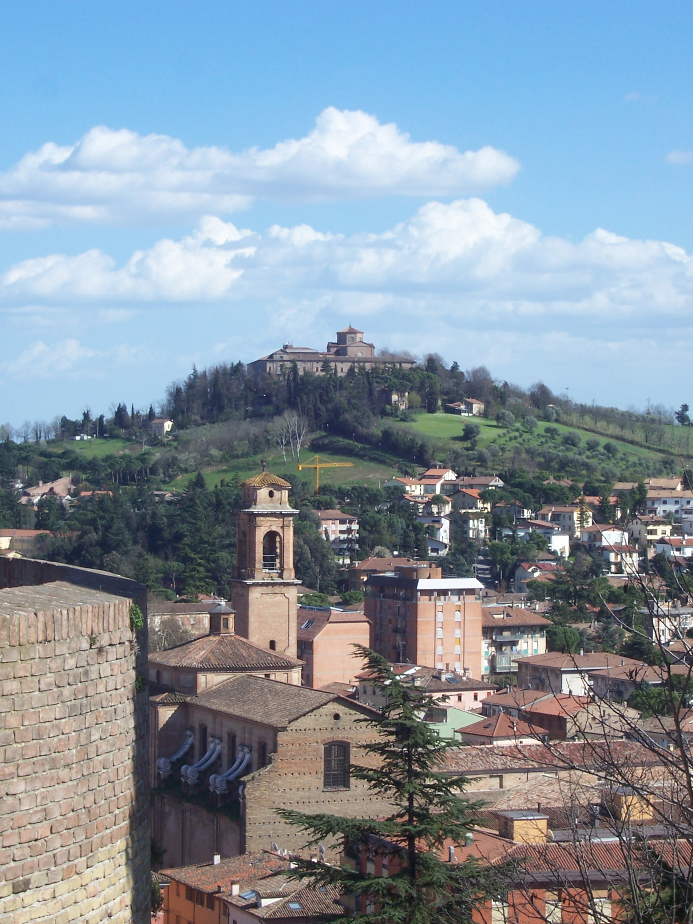 Panorama sull'Abbazia del Monte dagli spalti della Rocca Malatestiana di Cesena